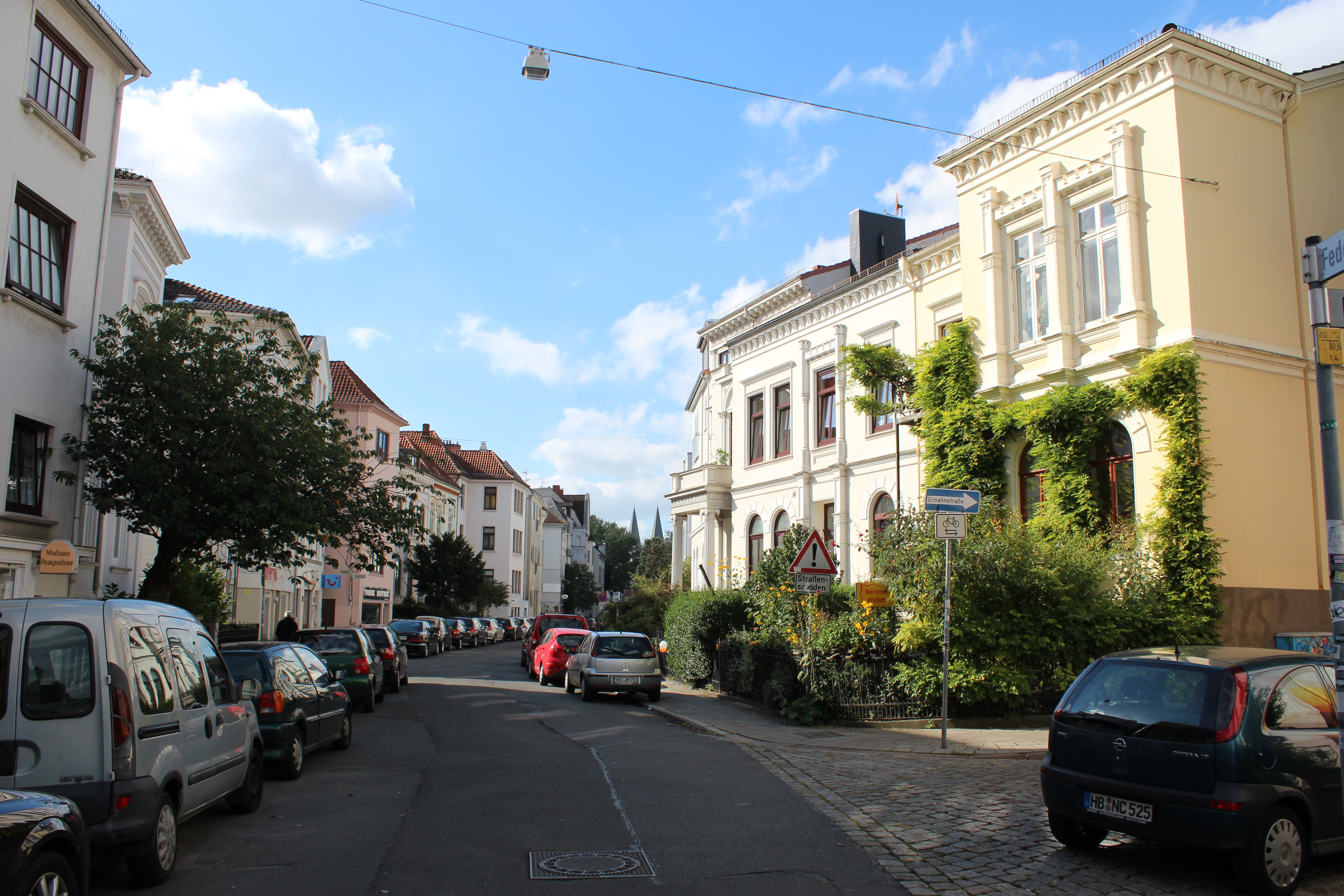 Ensemble Fedelhören in Bremen, FedelhörenDie Denkmalgruppe ist ein geschütztes Kulturdenkmal in der Freien Hansestadt Bremen, mit der Nr. 0320 beim Landesamt für Denkmalpflege registriert.